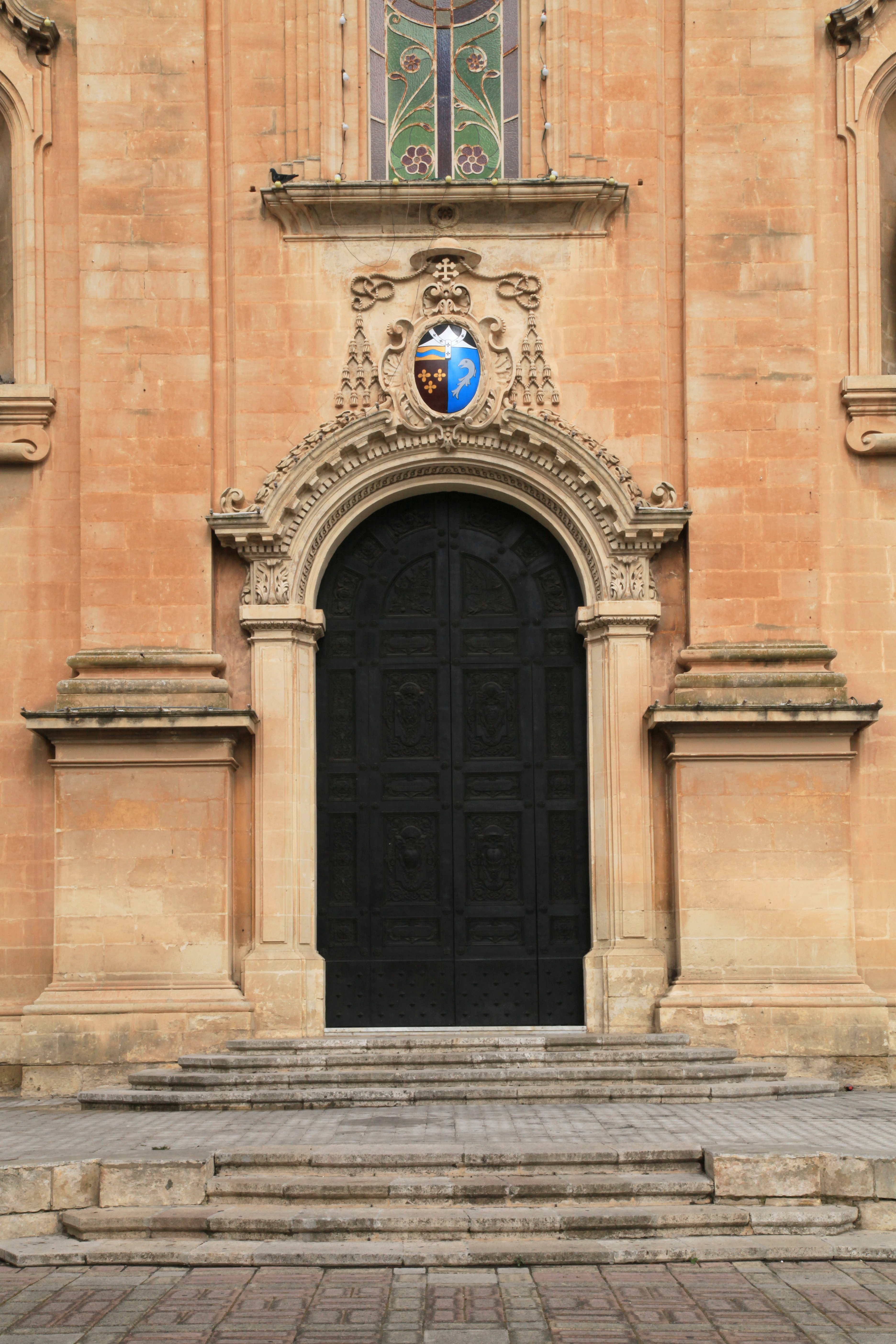 Naxxar Parish Church at Misraħ ir-Rebħa in Naxxar, Malta